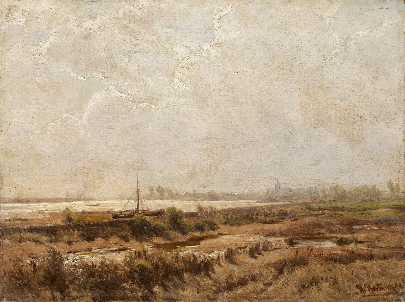 Der Rhein bei Neuss. Signiert und datiert unten rechts: H. Hartung 96. Öl auf Leinwand. 30 x 40 cm